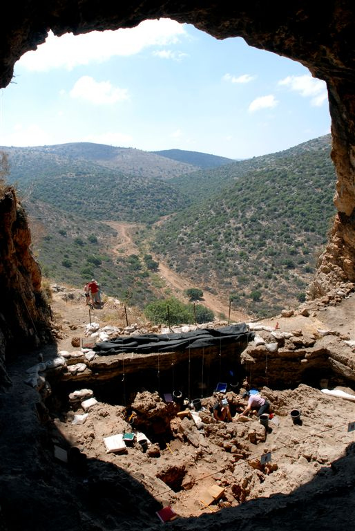 HILAZON excavation site July 2006